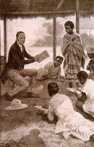 David Jones geeft les in Madagaskar